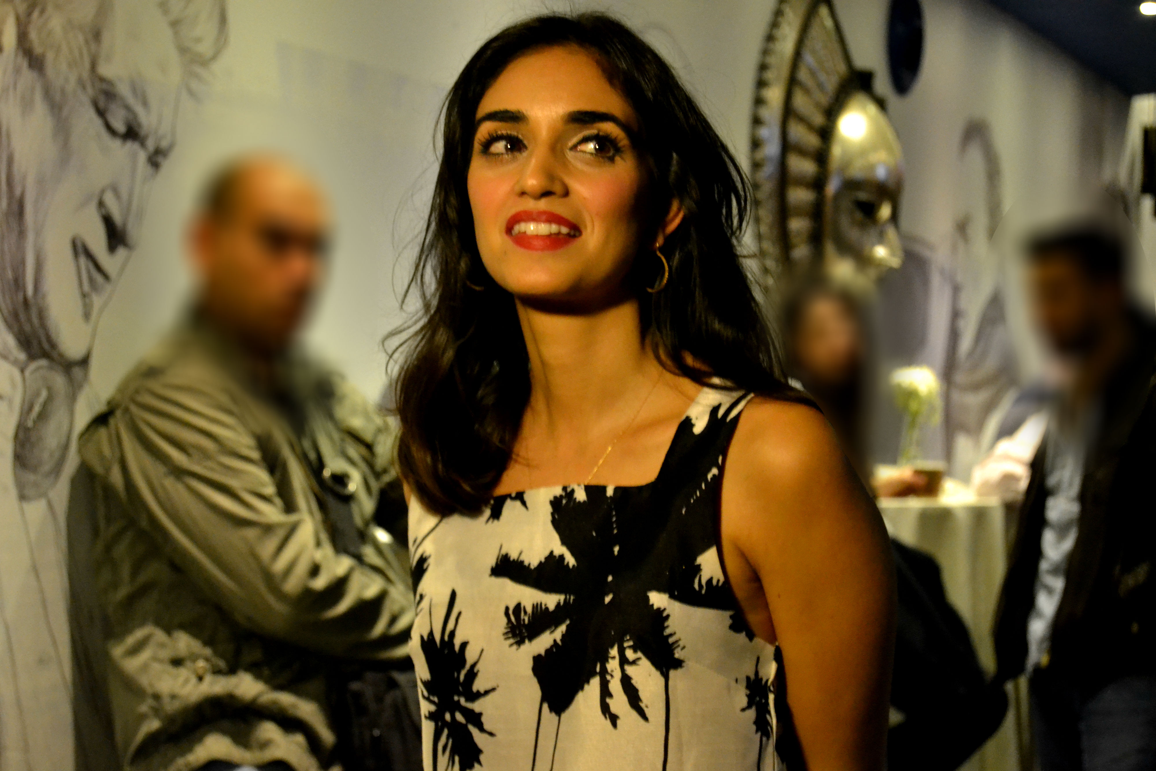 לירז צ'רכי בהשקת הסדרה "איפה אתה חי" (צילום יאיר פרש)